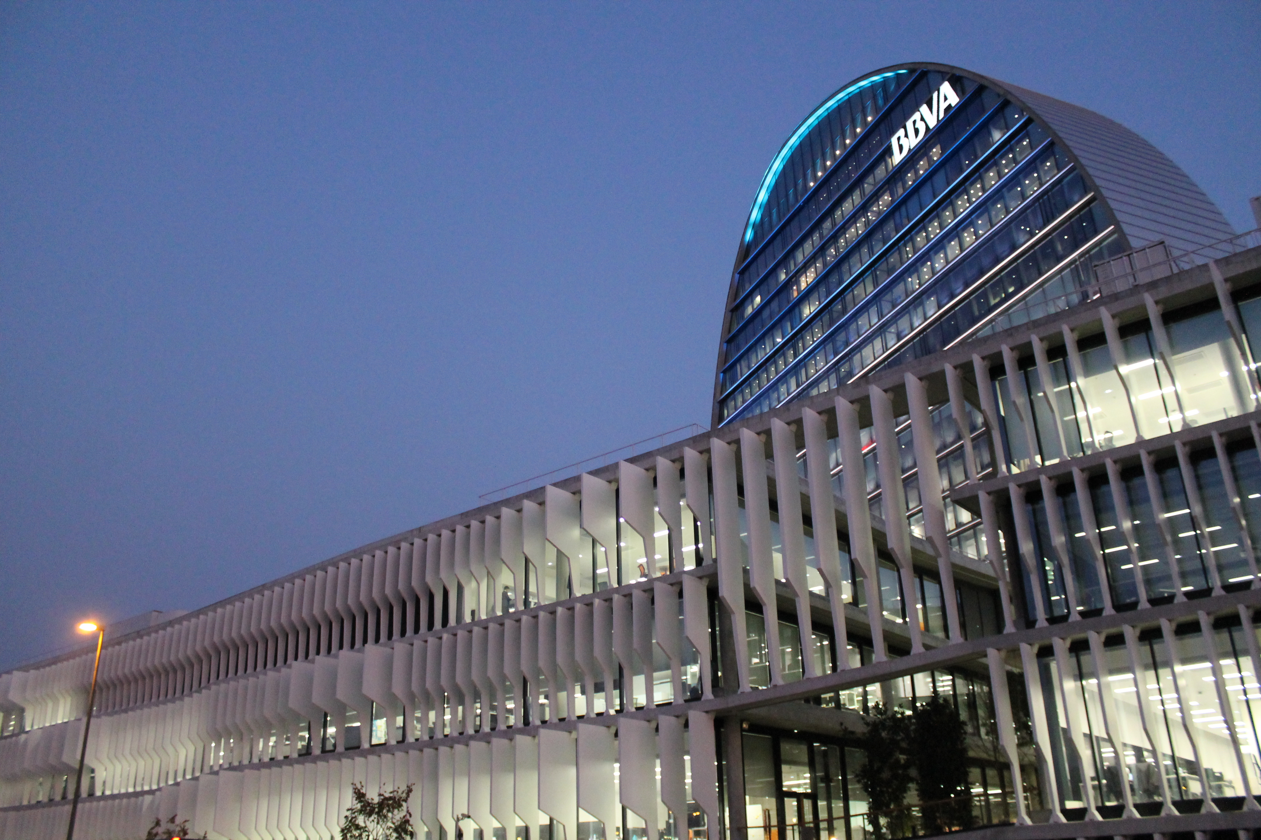 Vista nocturna del edificio de ciudad BBVA iluminado